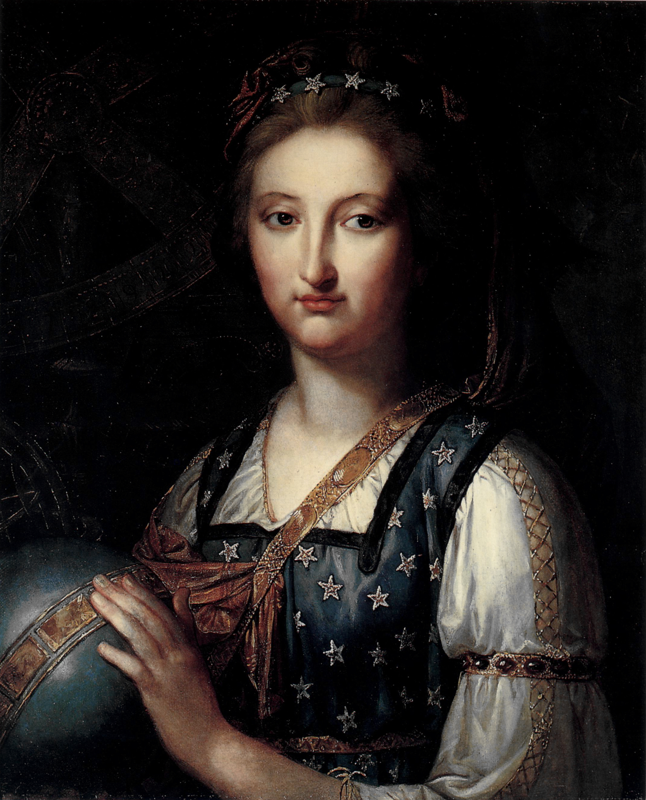 Allegorie auf die Sternenkunde